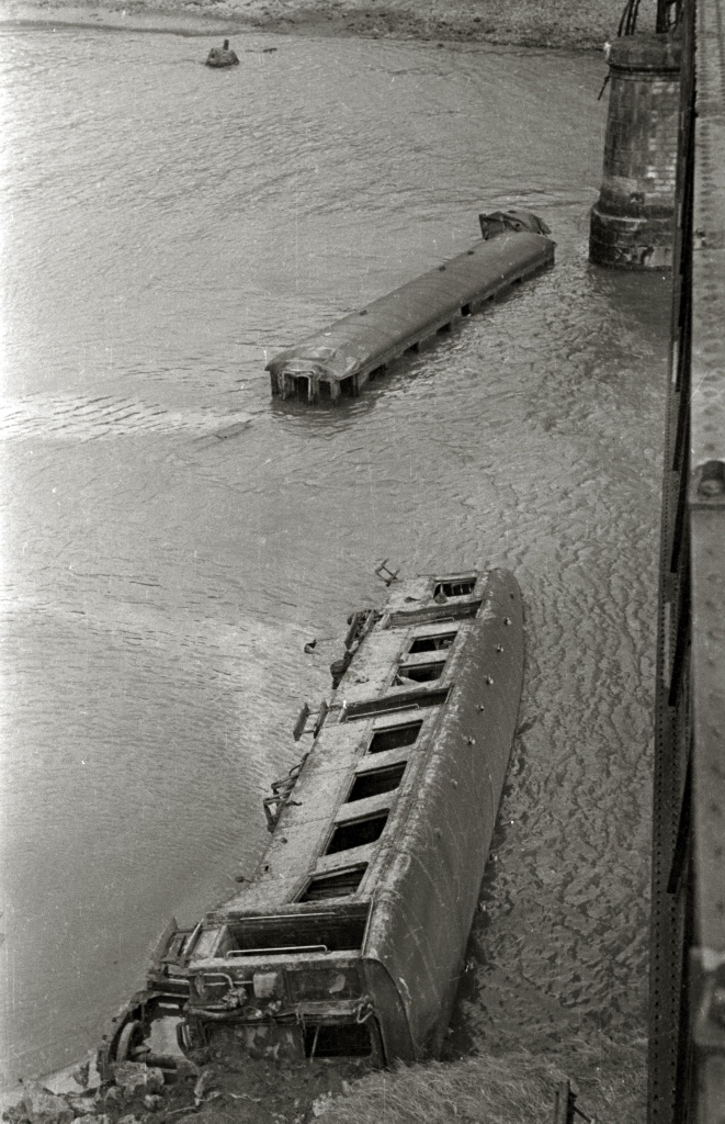 Título original: Accidente ferroviario, descarrilamiento de un tren de la línea Bilbao-San Sebastián en el víaducto de Zumaia debido a un temporal (2/6) Localización: Zumaya (Guipúzcoa)